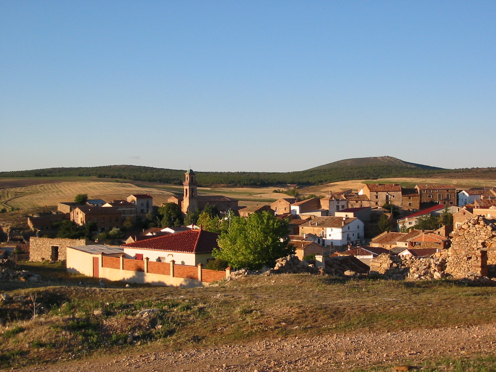 Parte del núcleo de población de Setiles